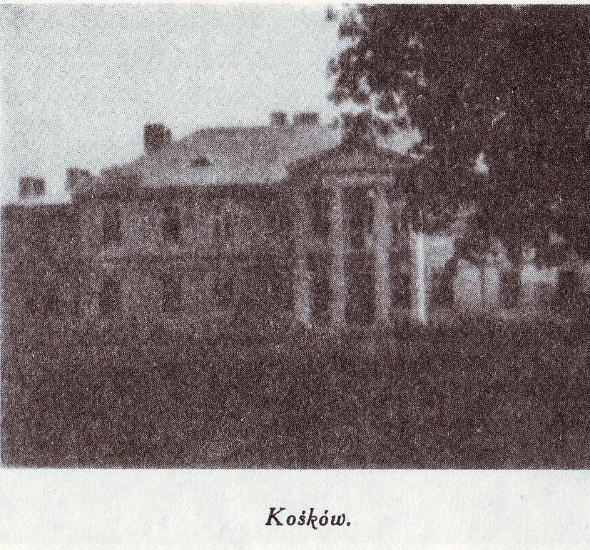 Kośków